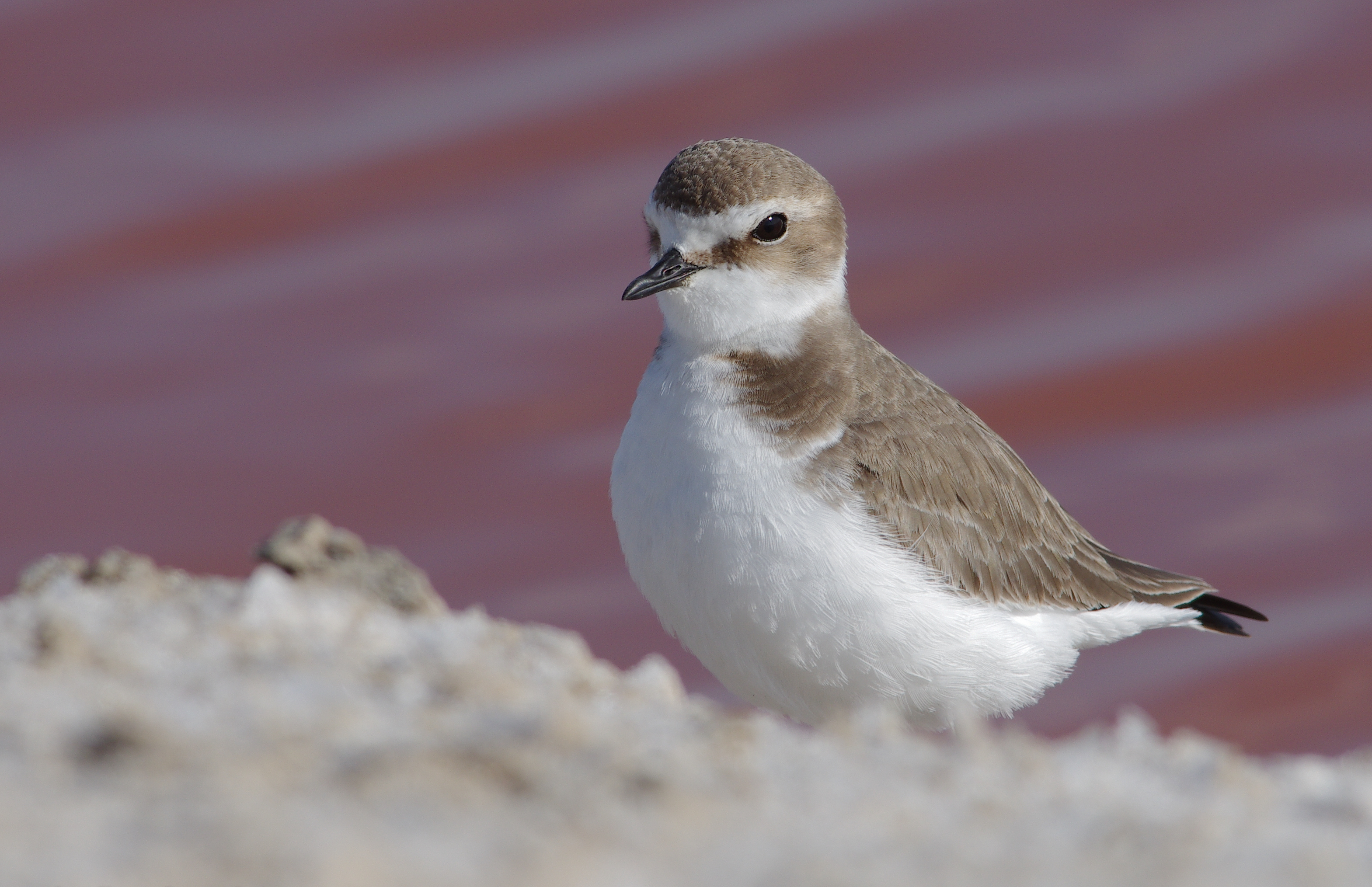 رسولُ الغيث الكِنتي، المعروف أحيانًا باسم القطقاط الإسكندراني